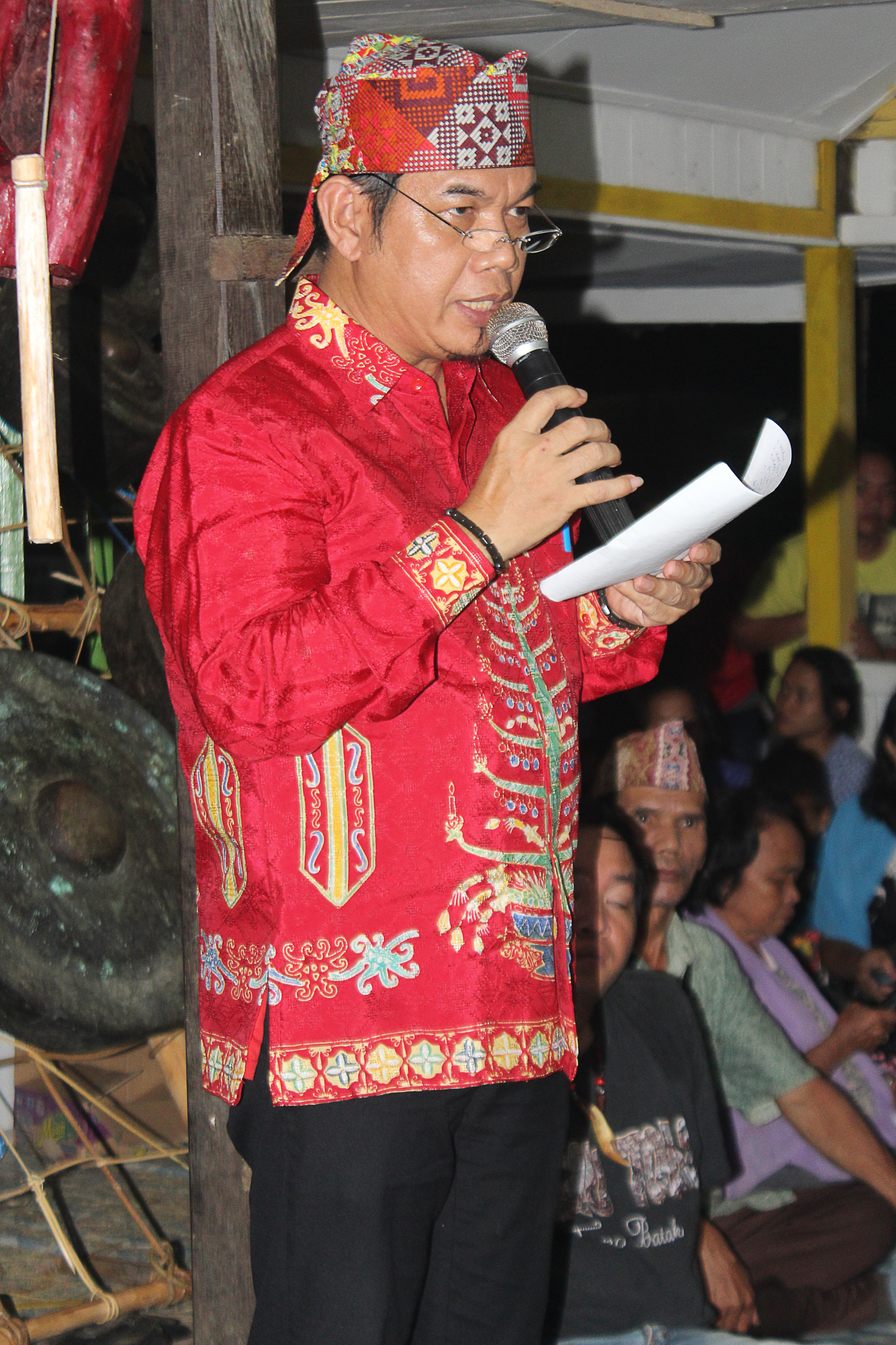 Ampera A.Y. Mebas, bupati Barito Timur periode 2013-2018 dan 2018-2023, saat hadir di acara ritual Ijambe pada 15 Juli 2017.